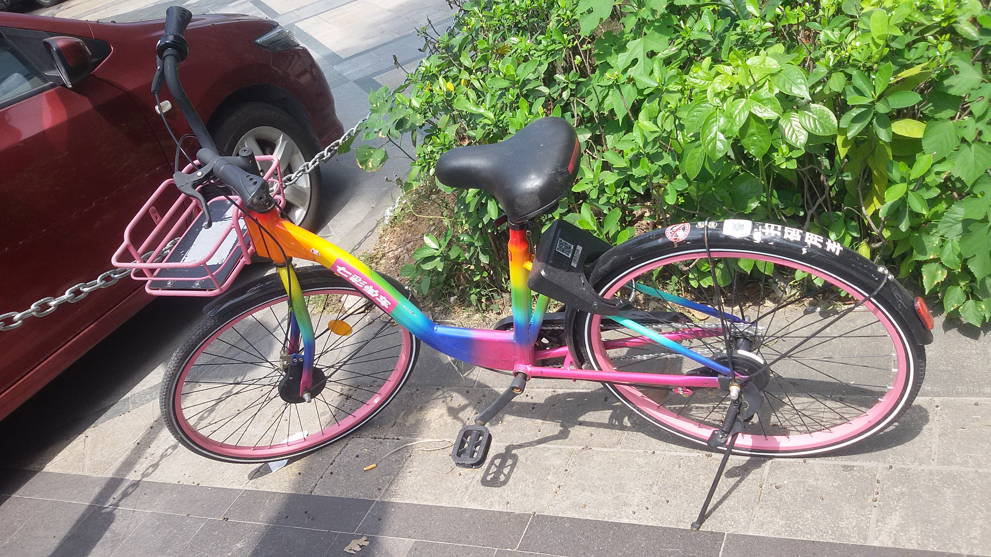 粵語: 七彩单车（紫色款）